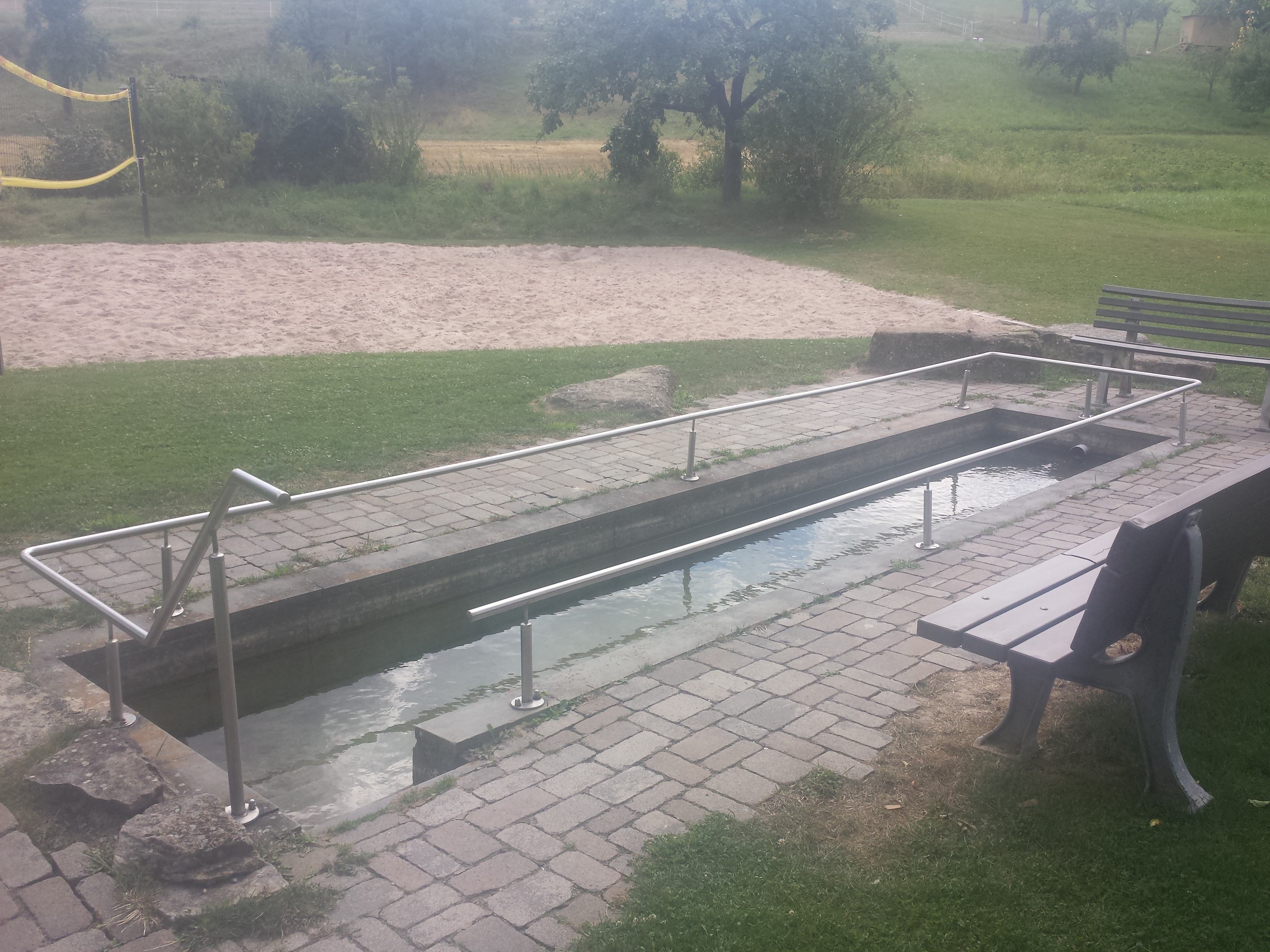 Naherolungsgebiet Dienstadter Wiesengrund. Keippanlage / Wassertreten.